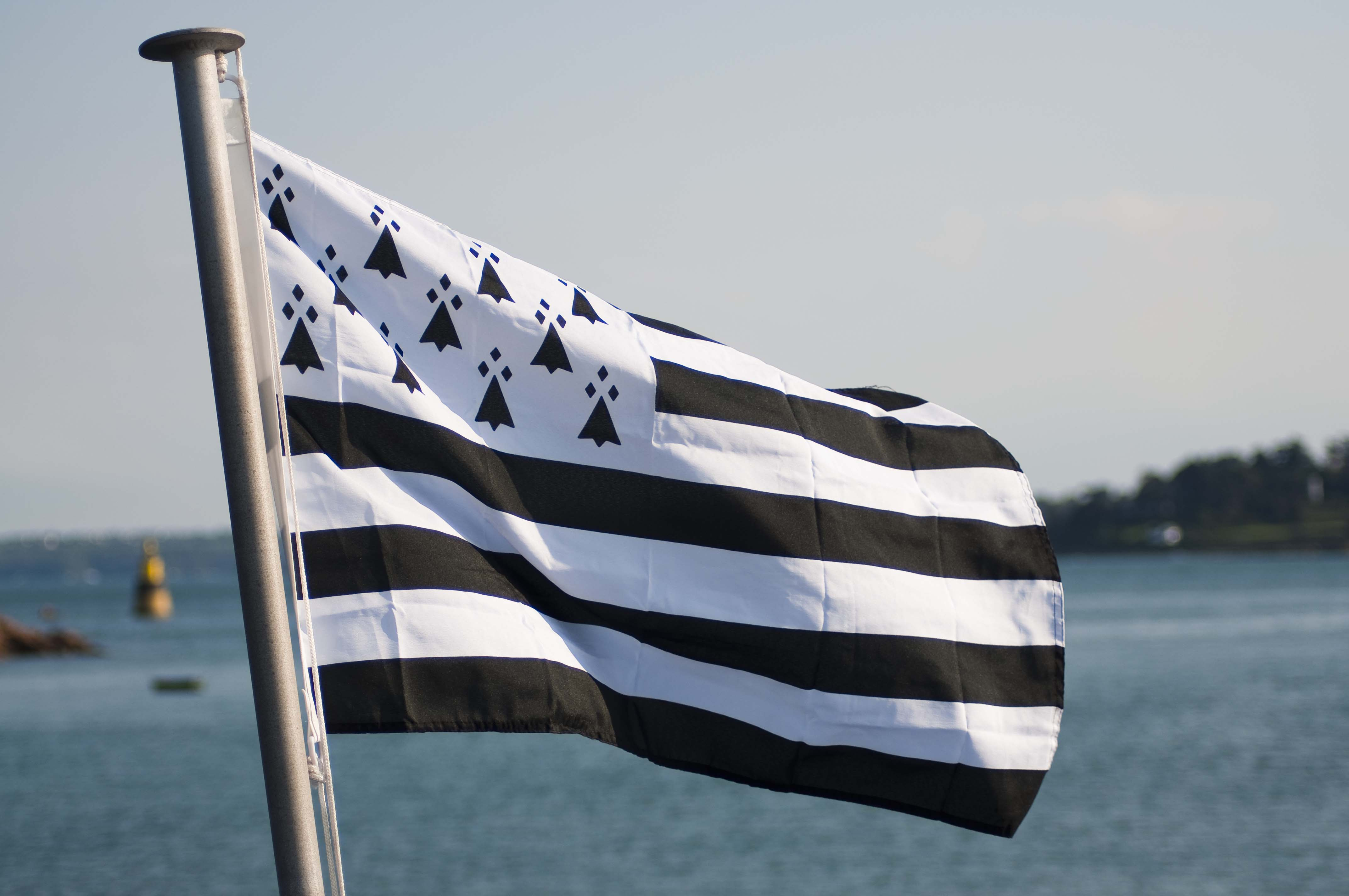 Gwenn ha Du, drapeau de la Bretagne